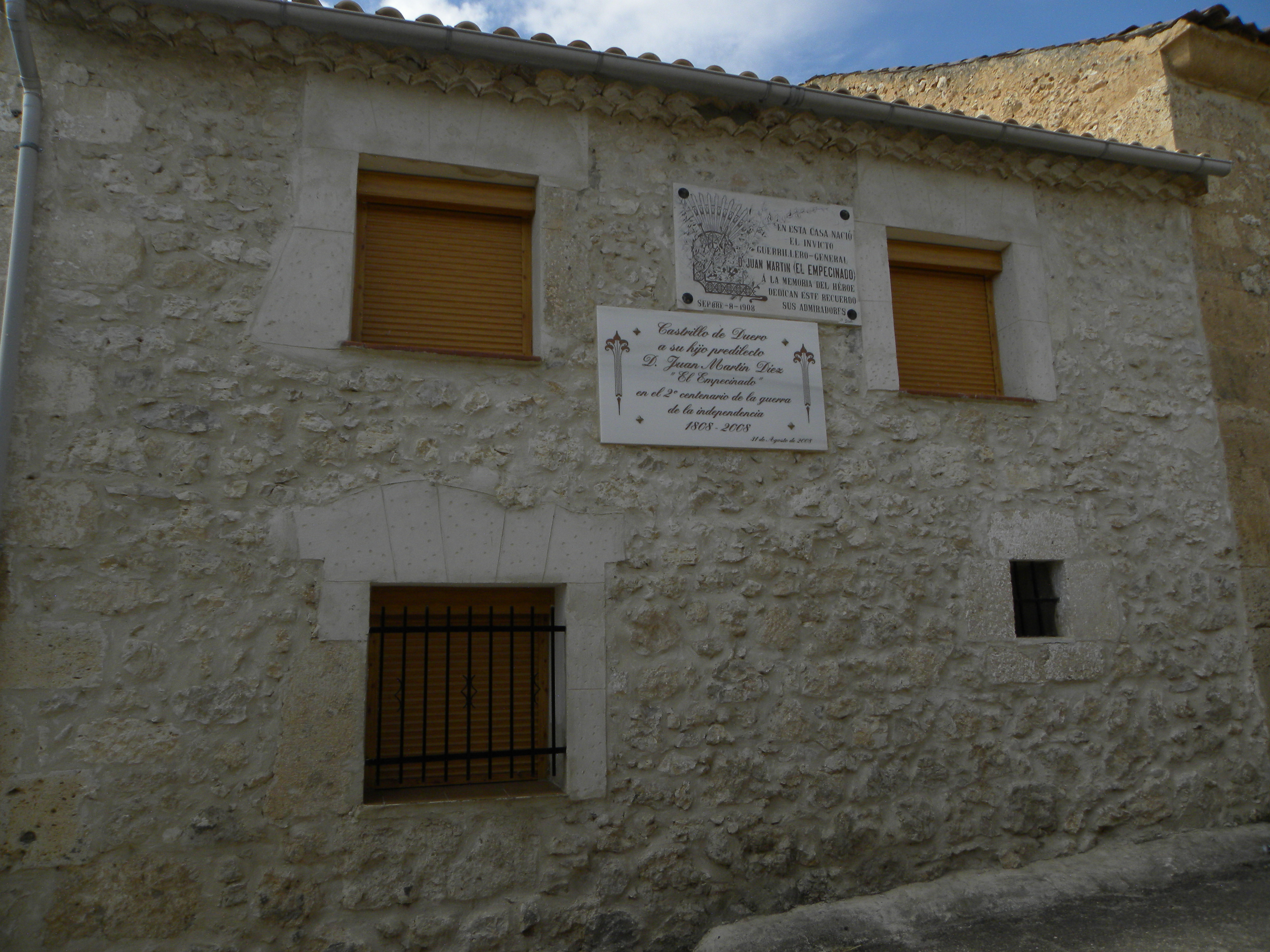 Empecinado's Home